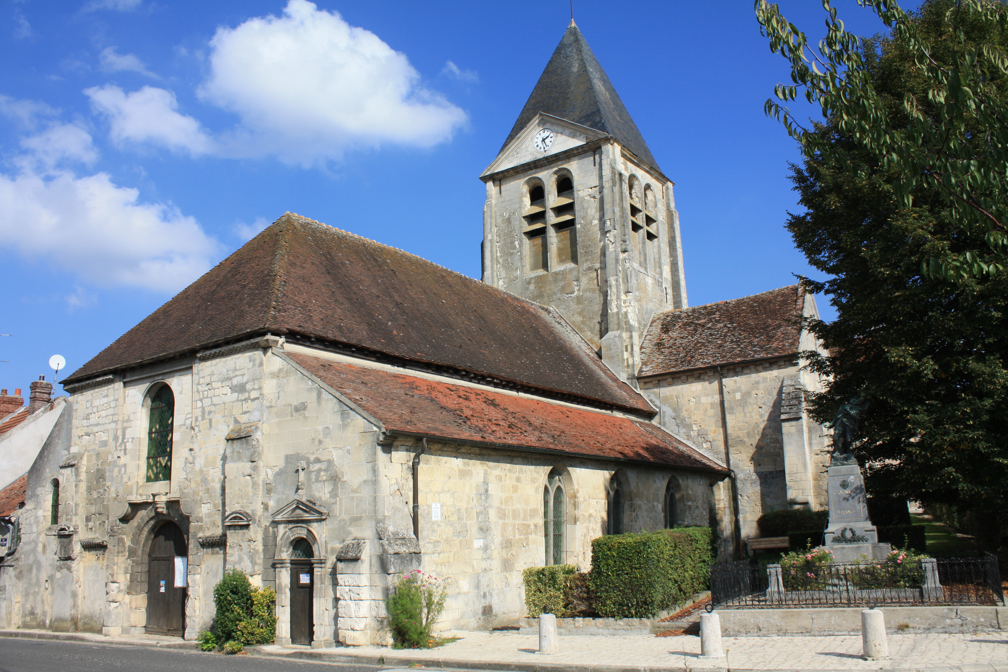 Église Notre-Dame-de-l'Assomption de Coincy